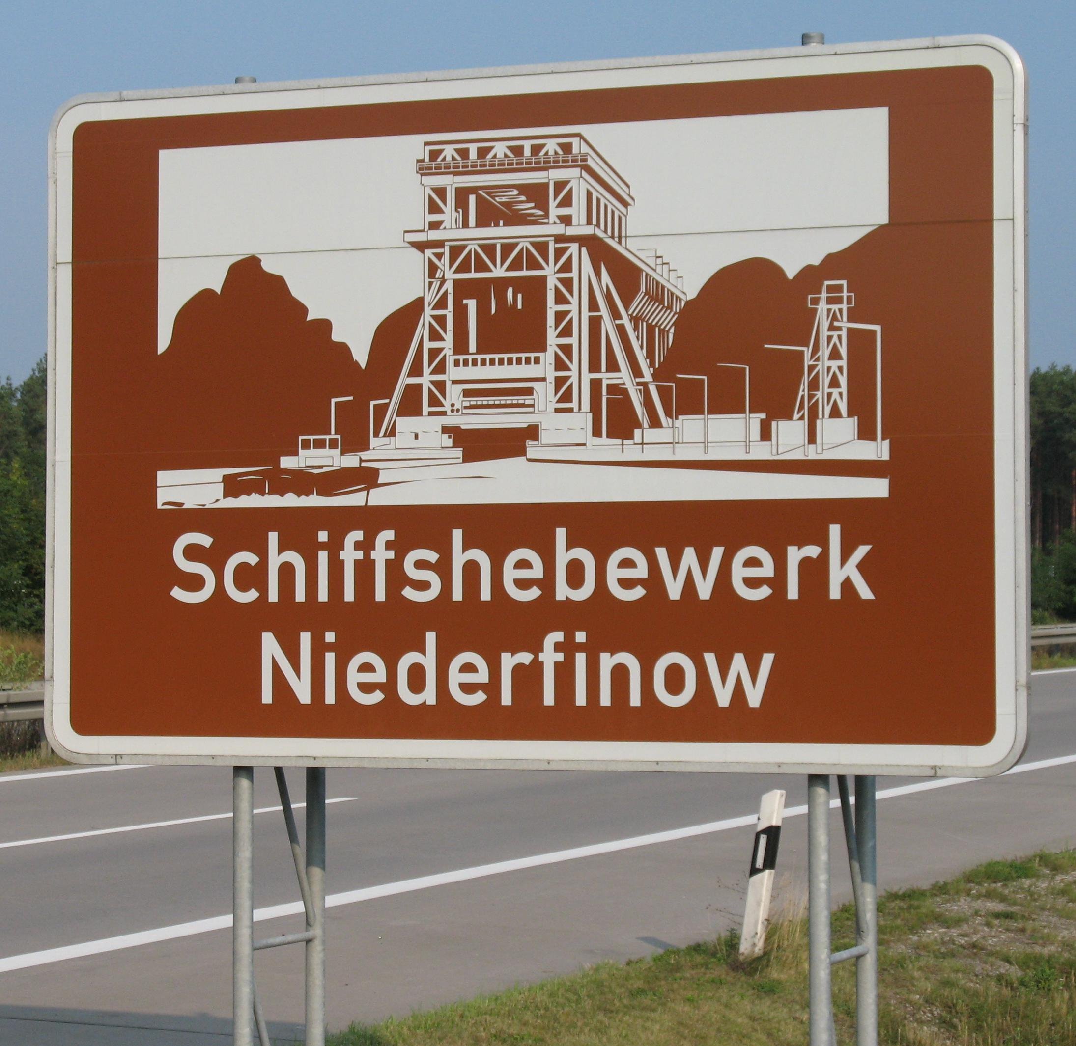 Unterrichtungstafel „Schiffshebewerk Niederfinow“ an der A 11 in Brandenburg, Deutschland (am Parkplatz „Ladeburger Heide“)